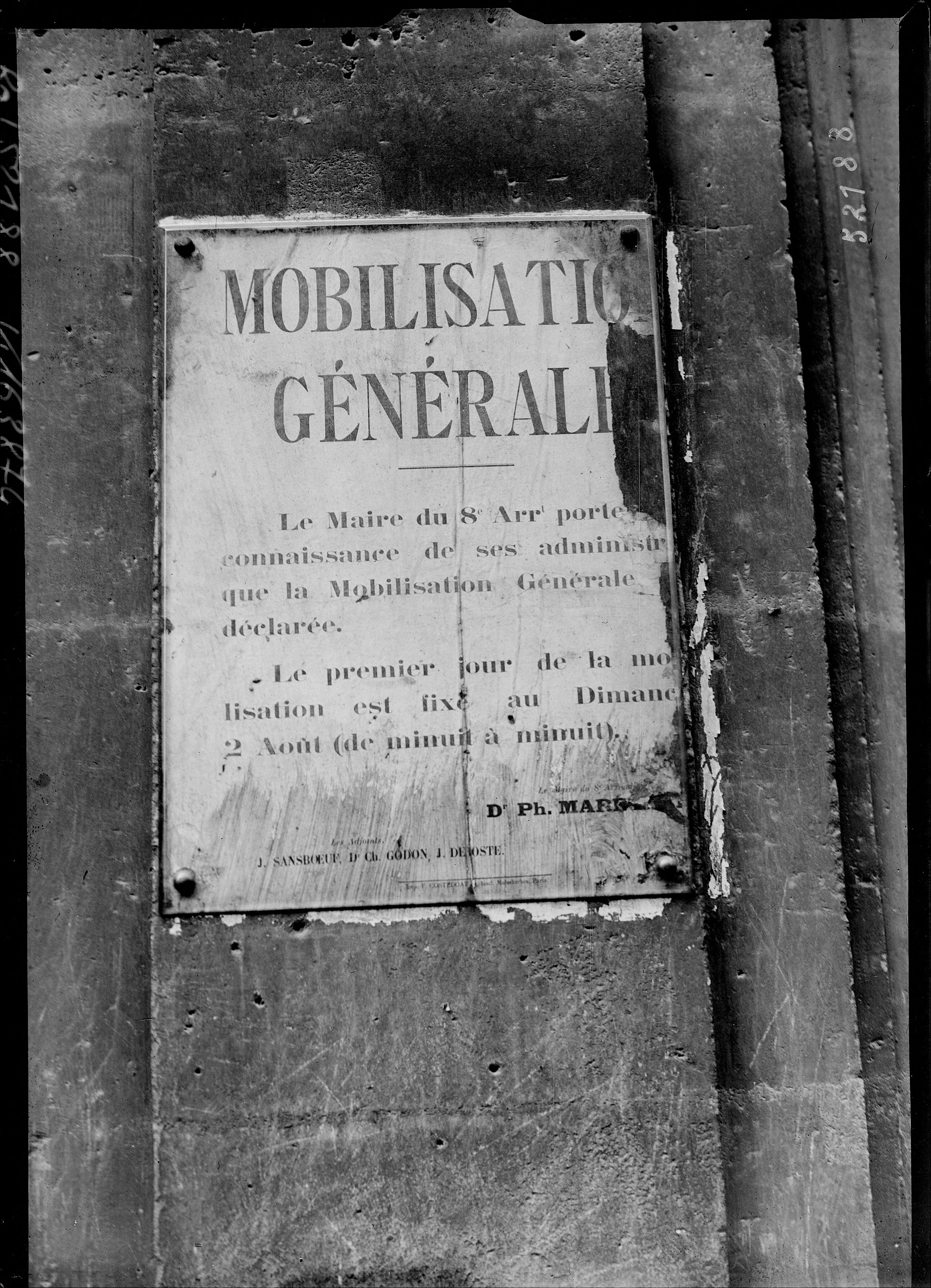 Affiche de la mobilisation générale, placardée par la municipalité du 8e arrondissement de Paris, rue Royale, en août 1914.